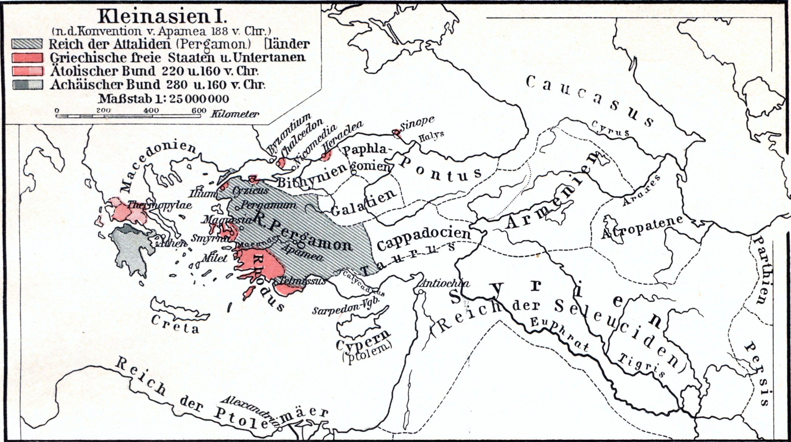 Karte von Kleinasien nach der Konvention von Apamea 188 v. Chr.